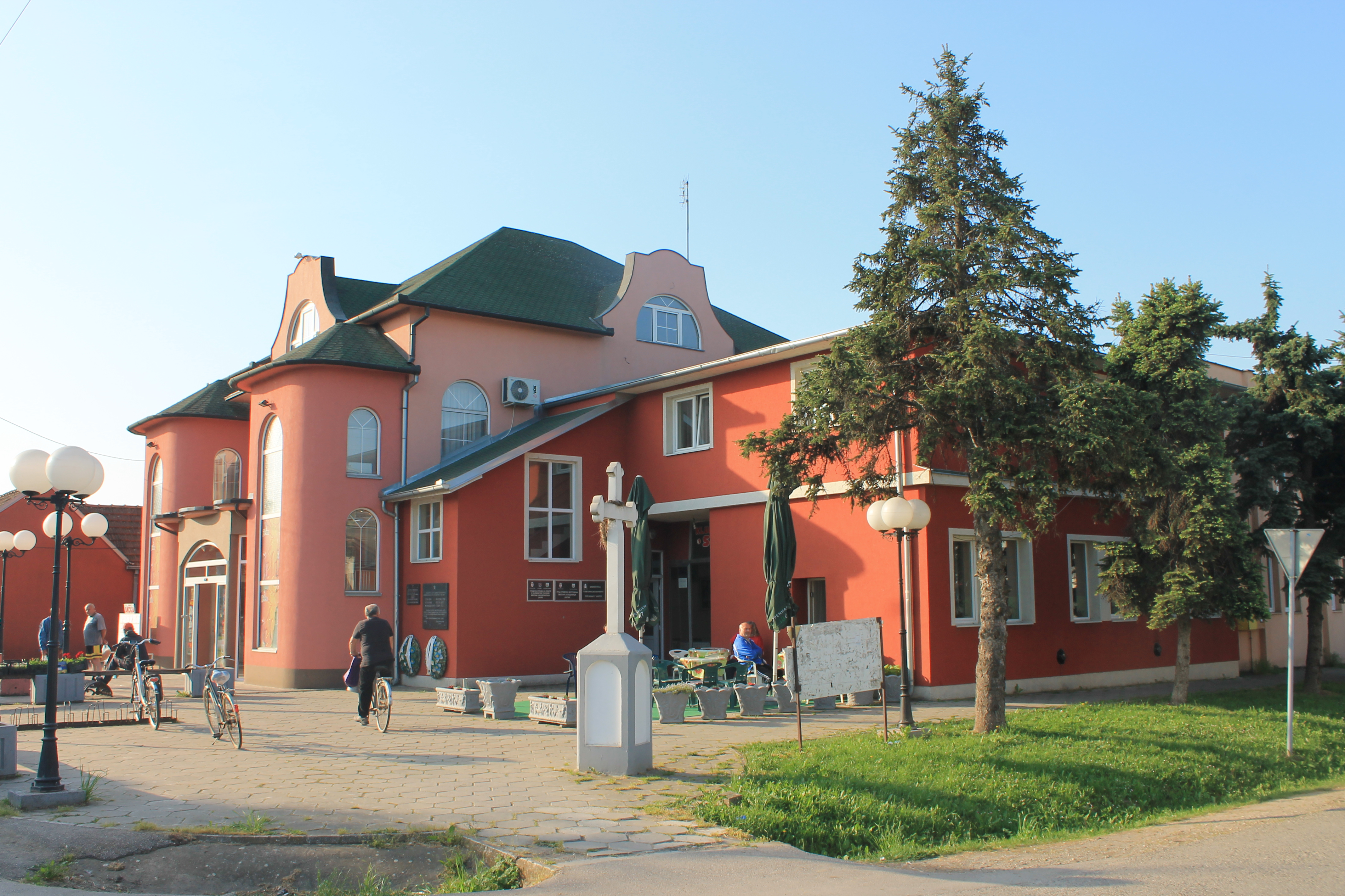 Jarak-centar sela